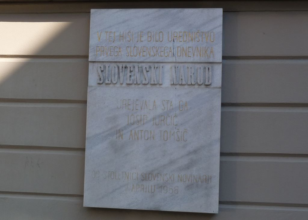 Prvi slovenski dnevnik Slovenski narod, Slomškov trg, Maribor